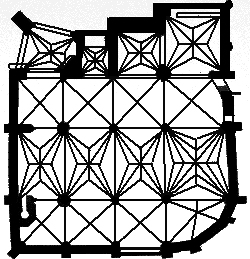 Planta de la iglesia de San Antón, Bilbao